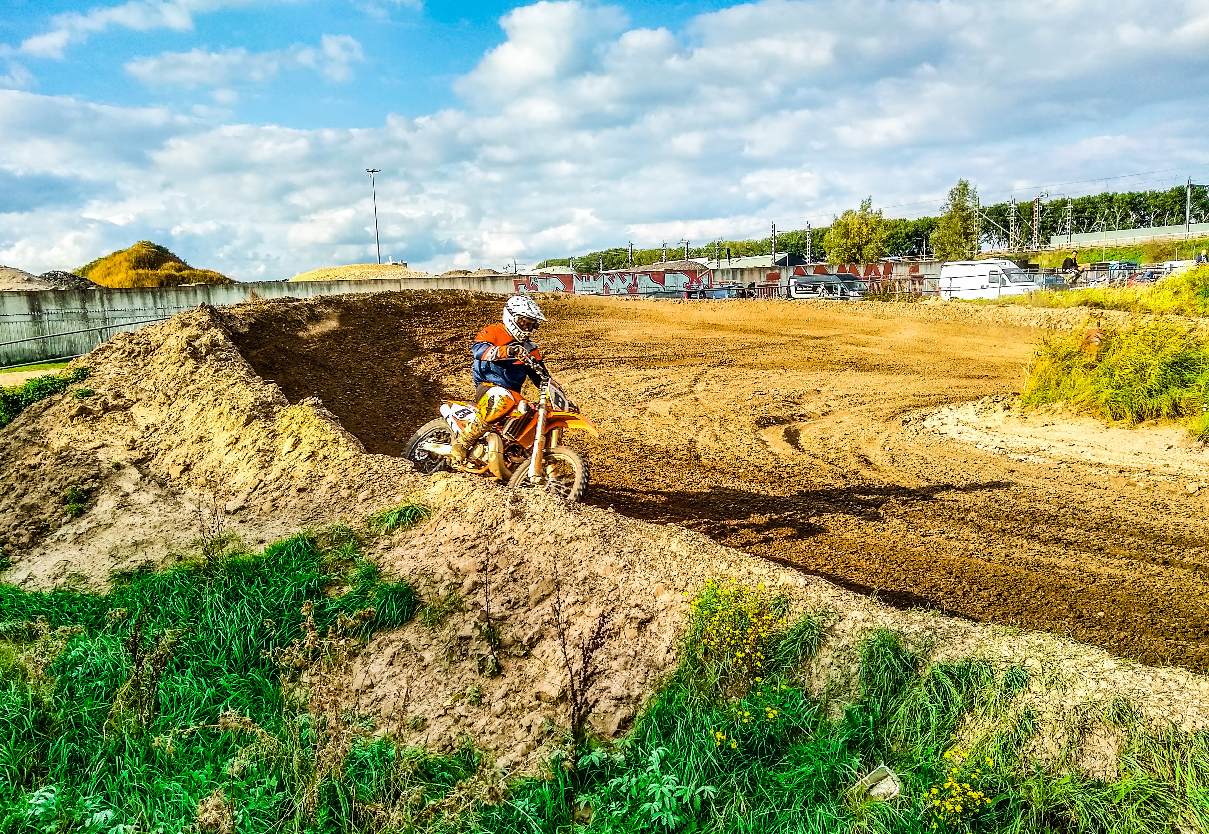 motorcross maarssen